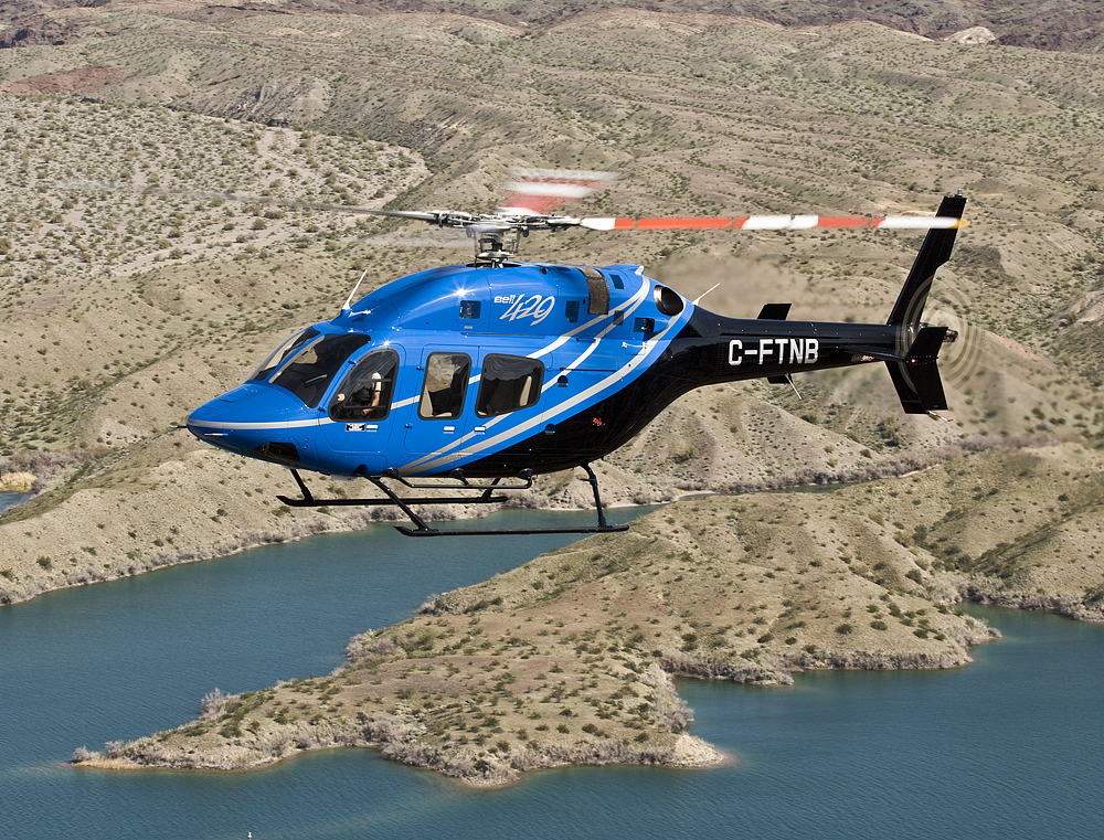 Ltvjycnhfnjh Bell 429, C-FTNB